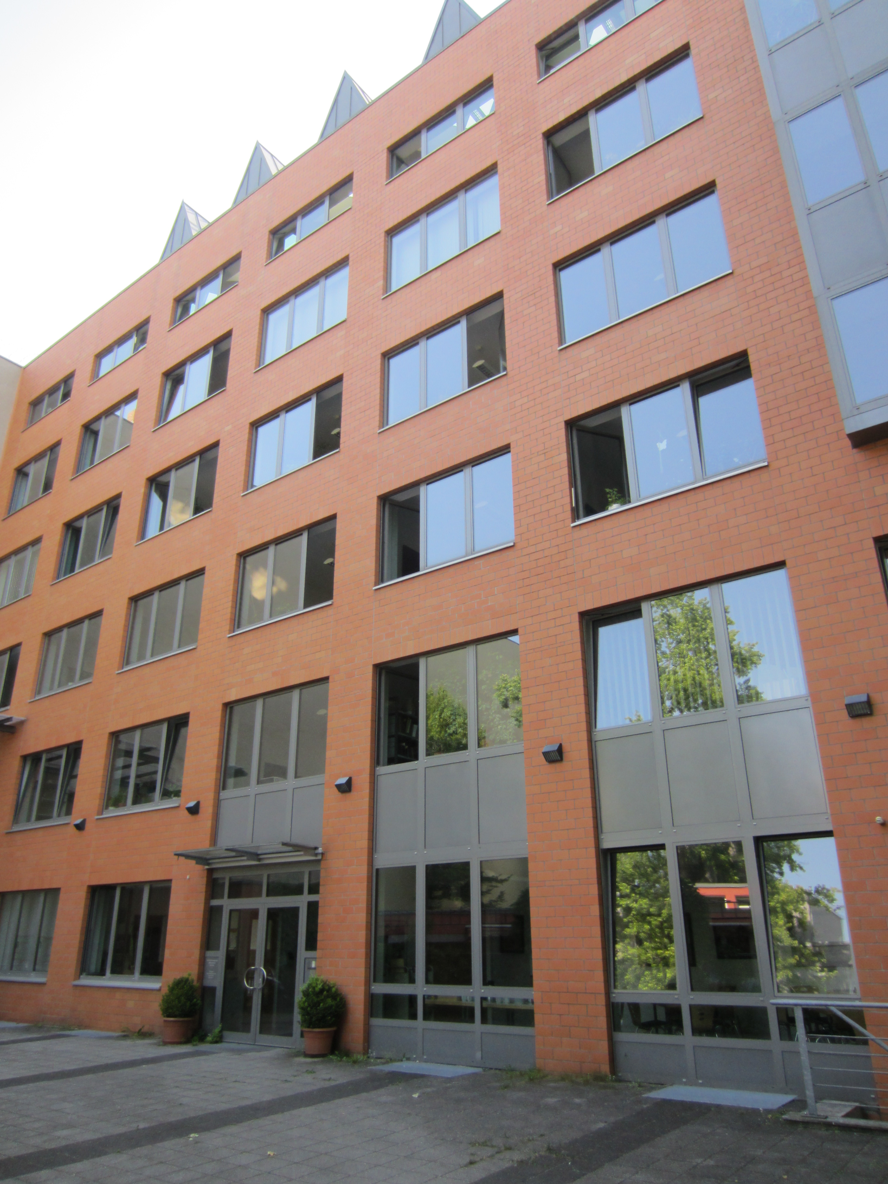 Vorderansicht des Archivgebäudes